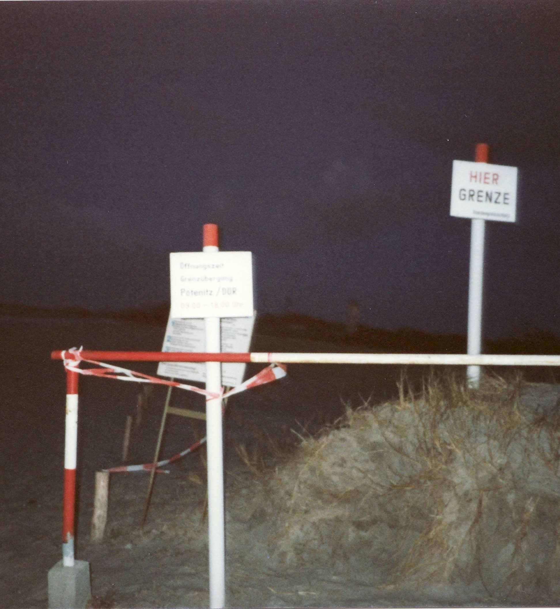 Grenzübergang Pötenitz, Mecklenburg-Vorpommern